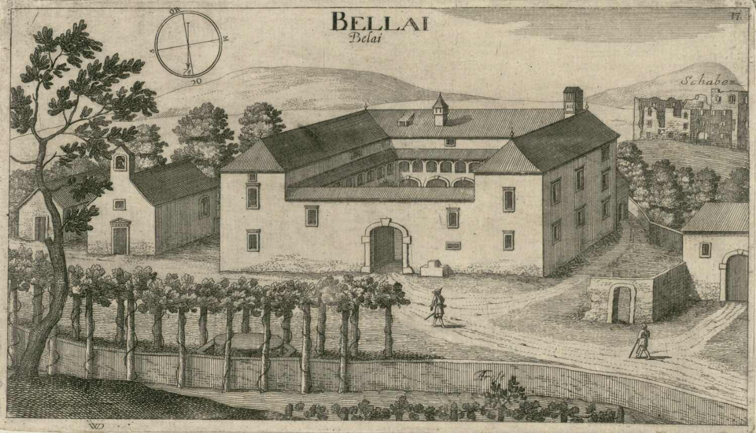 Belaj